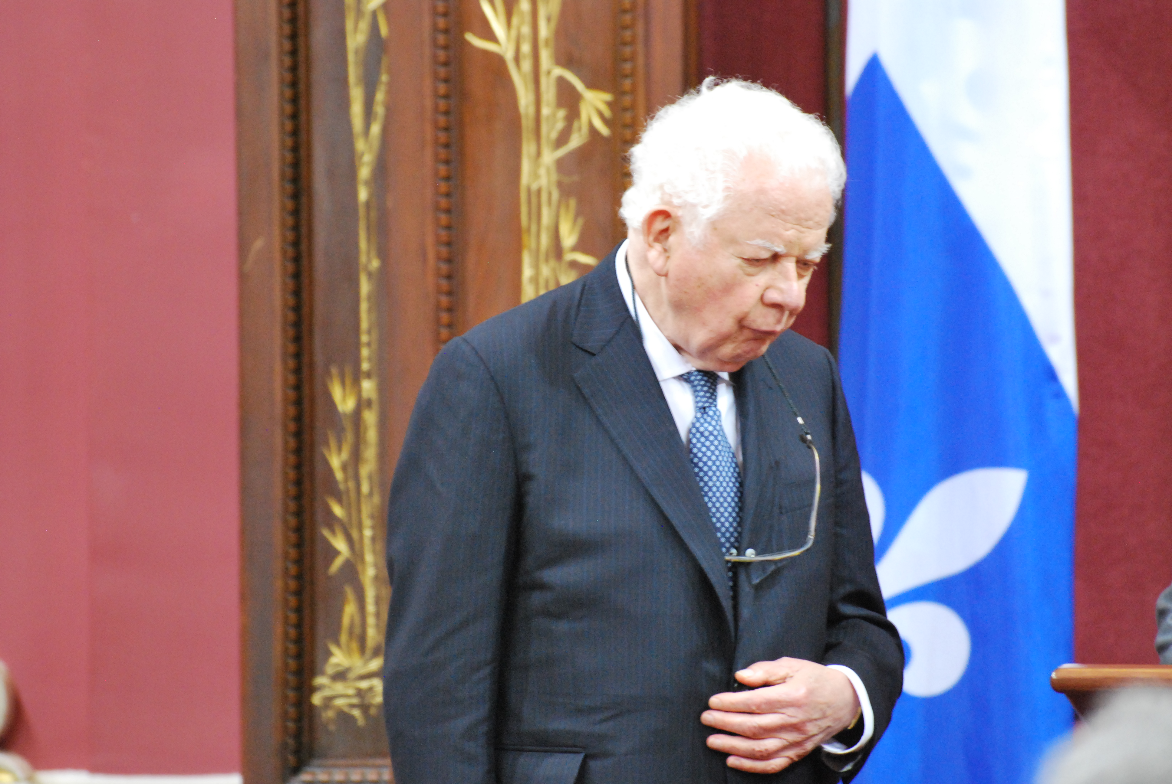 Cérémonie de remise de l'ordre national du Québec 2013. Bernard Lamarre